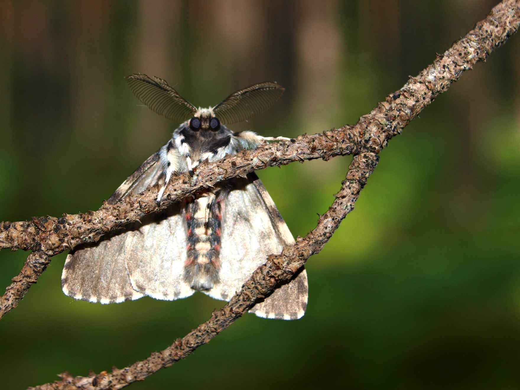 Pilt tehtud Perakülas Nõva vallas Läänemaal